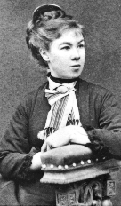 Ina Lange (1849-1930)